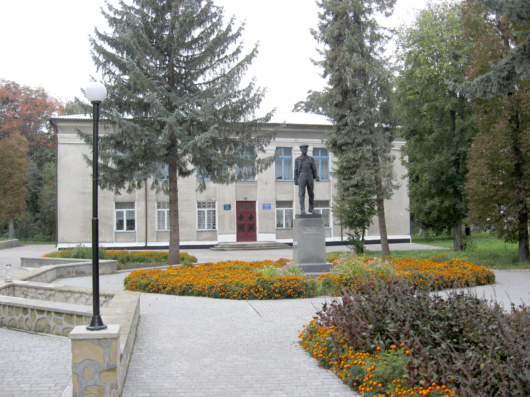 Пам’ятник герою-піонеру В. Шишковському. Місто Шумськ.